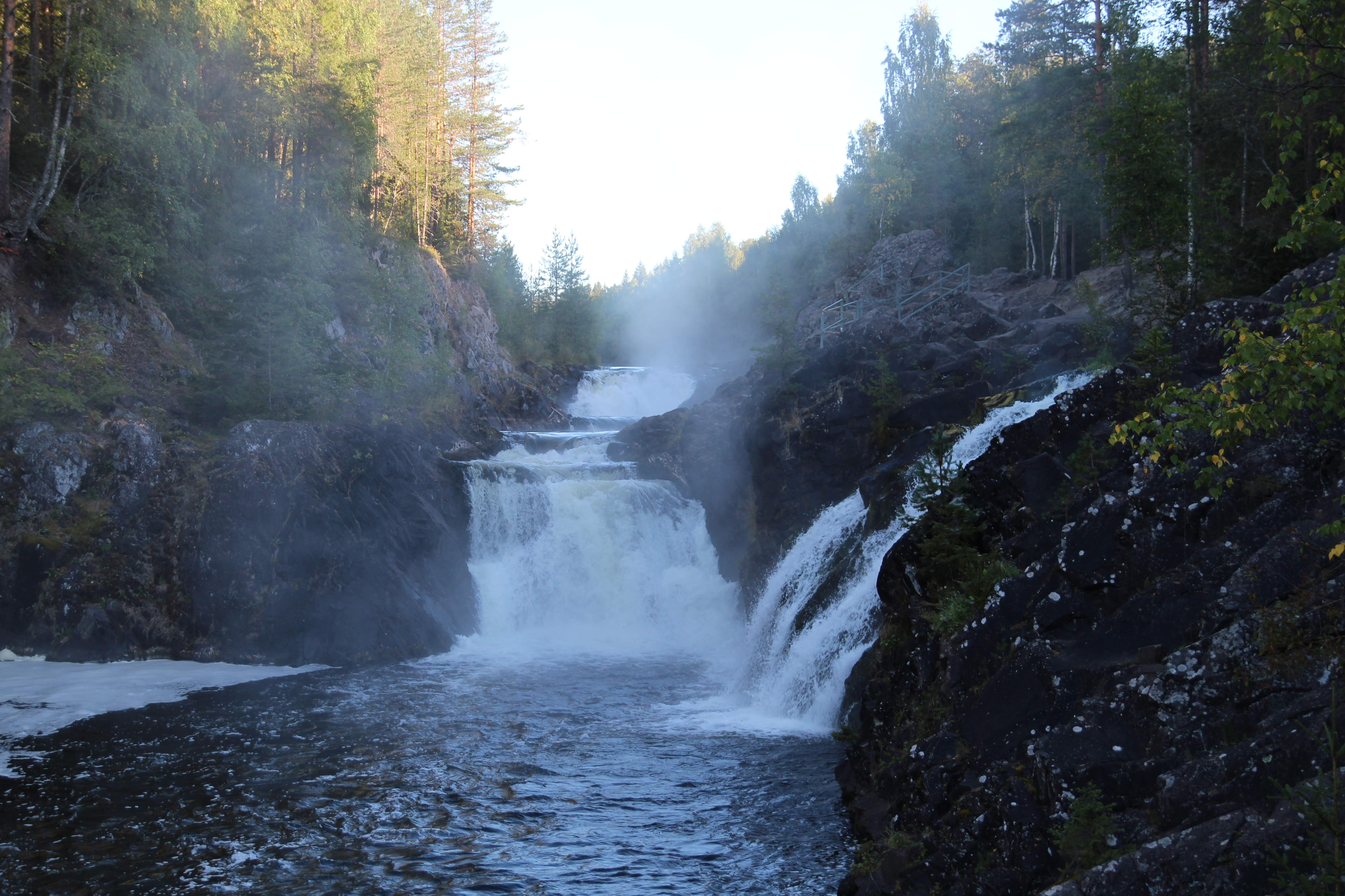 Заповедник «Кивач», Кондопожский район This image is related to the protected area of Russia number 1000032